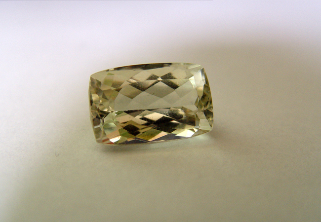 Facettierter Hiddenit (25,6ct), Varietät von Spodumen aus Afghanistan